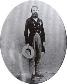 Heinrich XX., Mann von Caroline von Hessen-Homburg